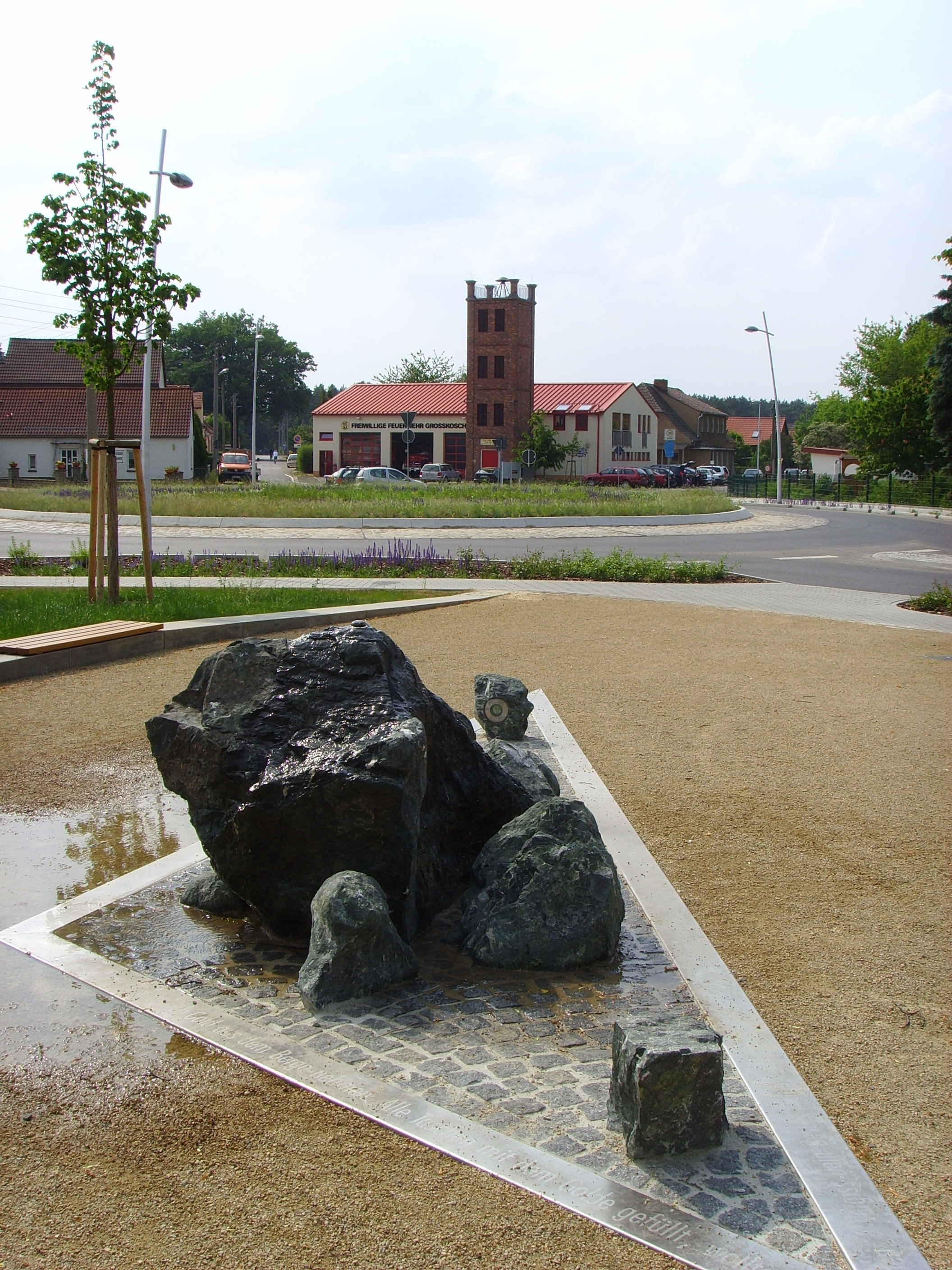 Brunnen im Senftenberger Ortsteil Großkoschen, im Hintergrund die Feuerwache